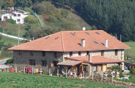 Miru buztan (Mendexa, Bizkaia)